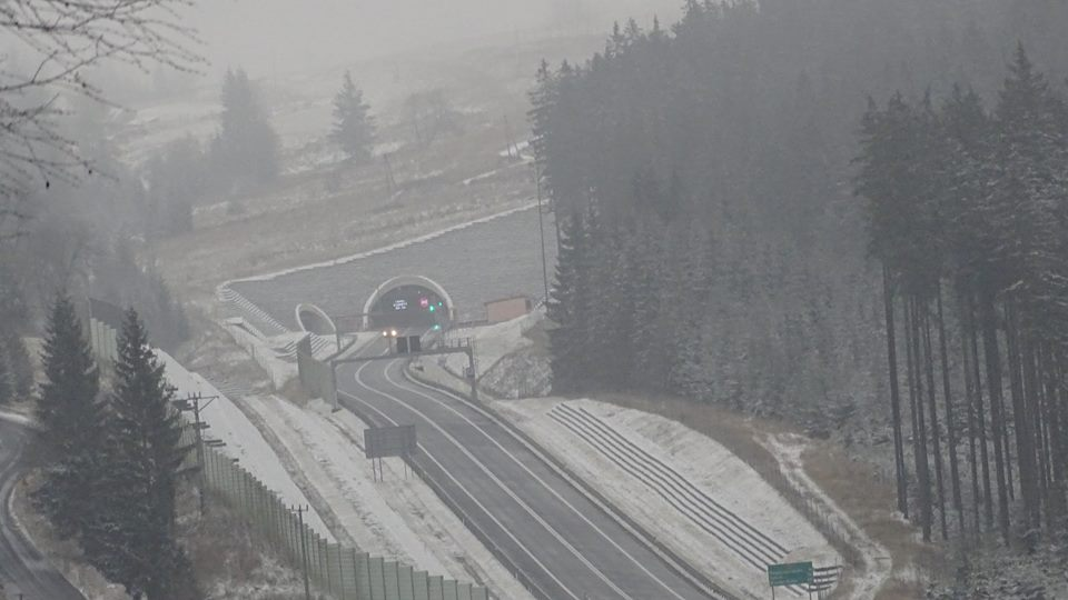 Tunel Emilia w Lalikach w Zimie